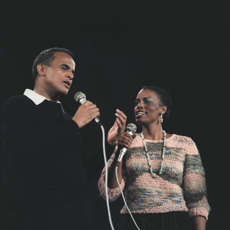 ADN-ZB/Lochmann/25.10.82/ Berlin: Auf der Manifestation der FDJ für den Frieden der Welt und gegen den NATO-Raketenbeschluß im Palast der Republik riefen die Lieder von Harry Belafonte und Dianne Reeves aus den USA große Begeisterung hervor.